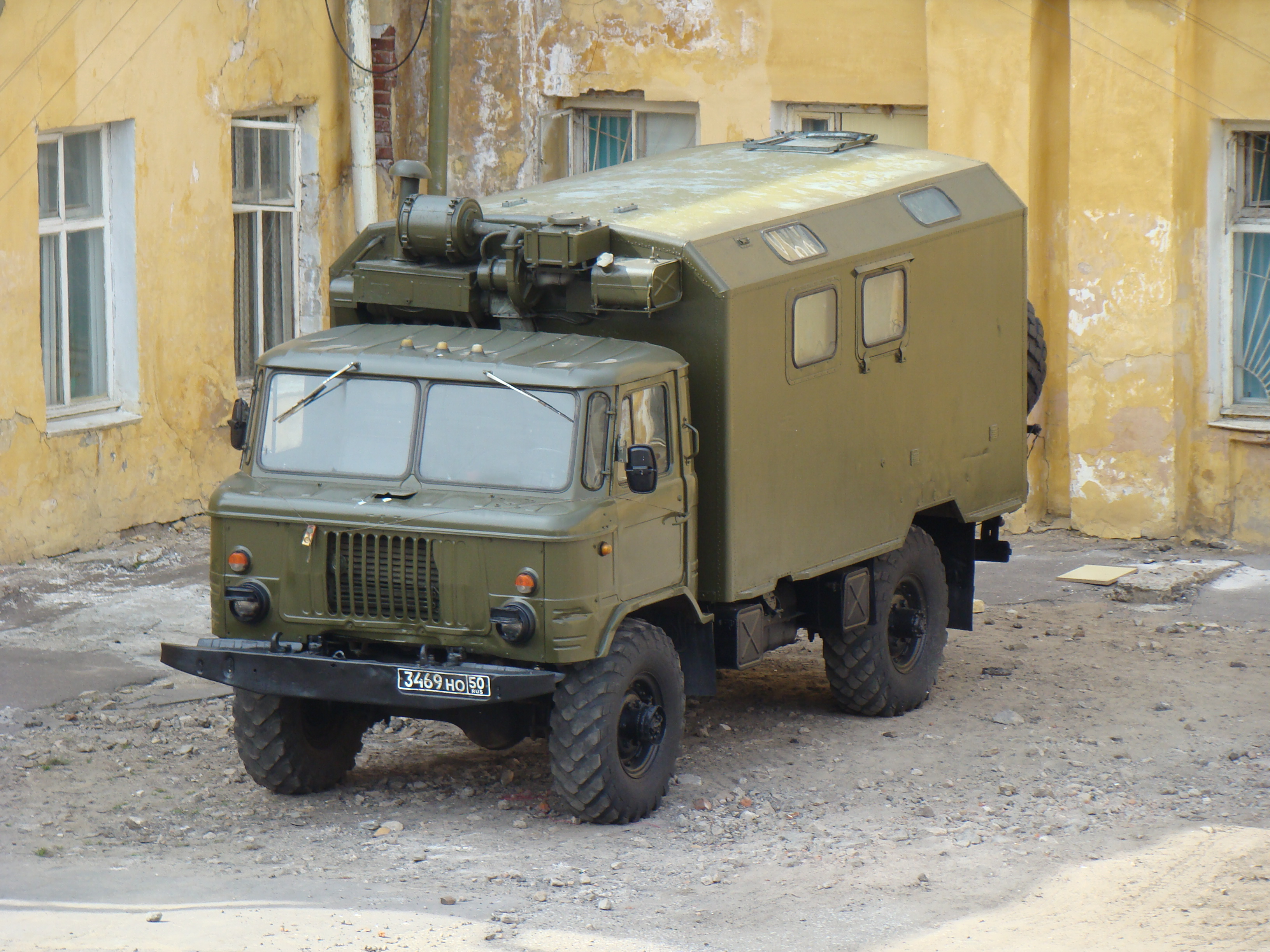 GAZ-66